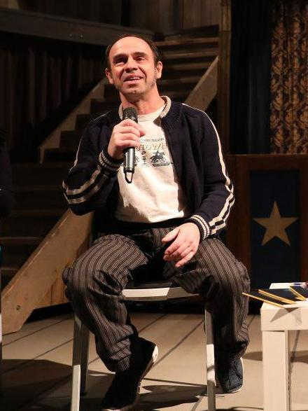 El director artístico de Naves Matadero – Centro Internacional de Artes Vivas, Mateo Feijóo, ha presentado esta mañana la segunda parte de la temporada 2017/2018 de este espacio municipal, así como el espectáculo DeadTown, de la compañía de los hermanos Forman, que se representa en este espacio del 18 al 28 de enero. Lo ha hecho acompañado por la directora de Programas y Actividades Culturales del Área de Cultura y Deportes del Ayuntamiento de Madrid, Getsemaní de San Marcos. Todos los espectáculos programados serán gratis, de martes a viernes, para los madrileños y madrileñas de 16 a 26 años que dispongan de JOBO (Bono Joven Cultural).